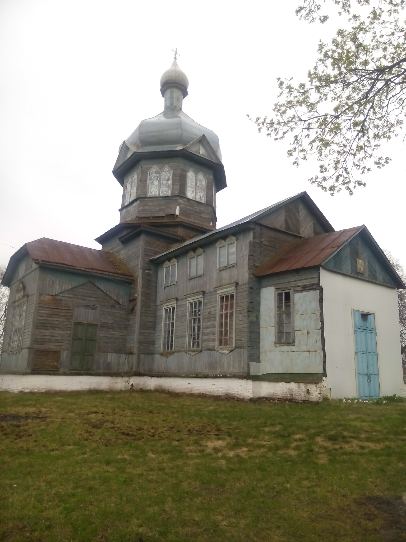 Церква Різдва Богородиці (XVII ст.). с. Петрушин, Чернігівський район, Чернігівська область